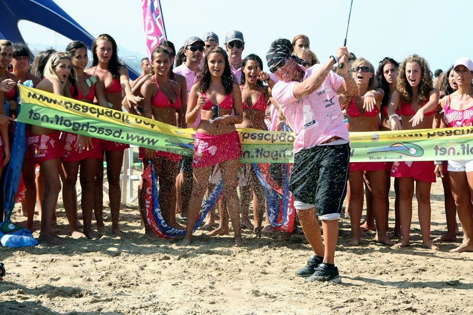 Kako treba pravilno udariti lopticu